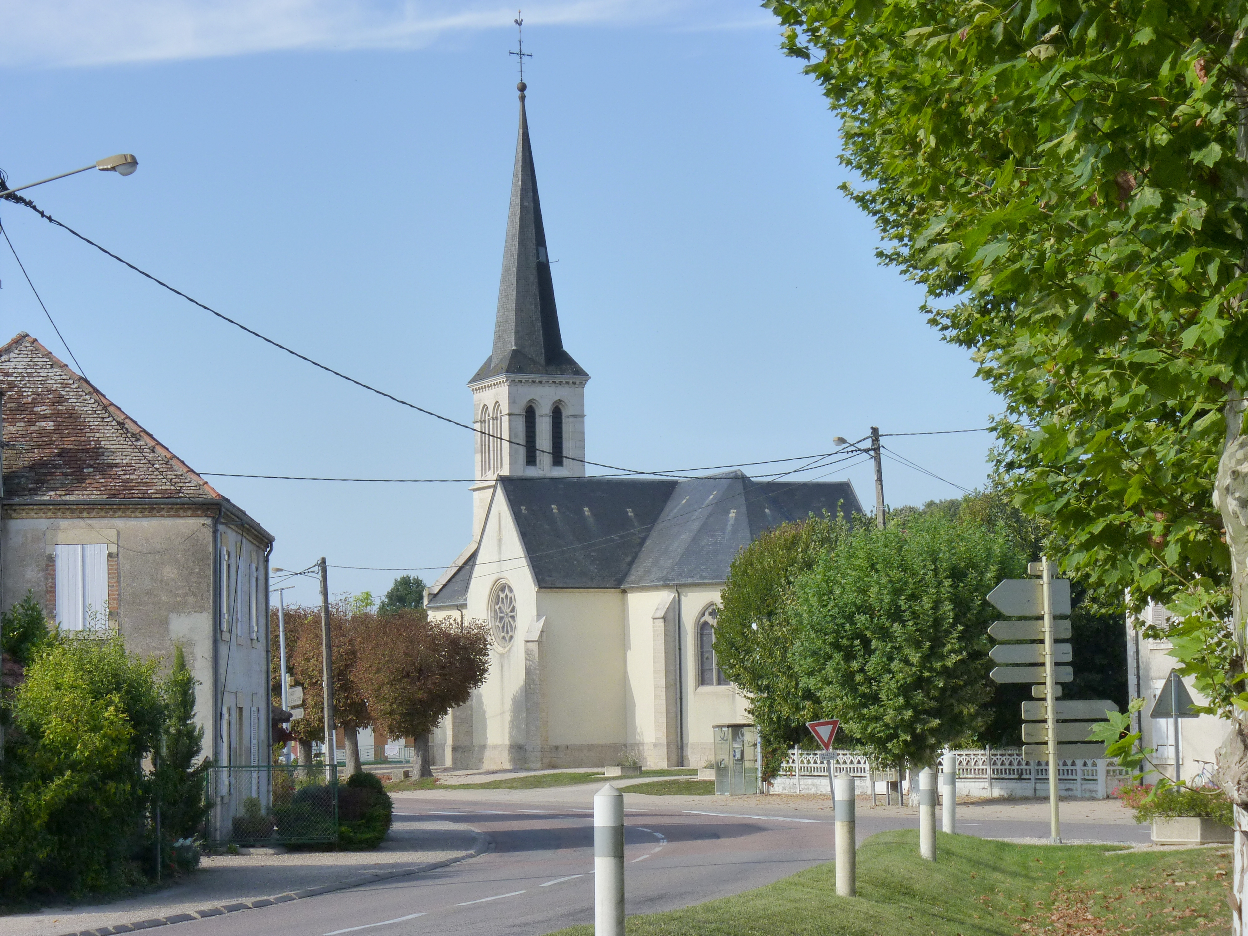 Église paroissiale Saint-Antoine de Pagny-le-Château, vue depuis la Place des Platanes (Côte d'Or, Bourgogne, France)